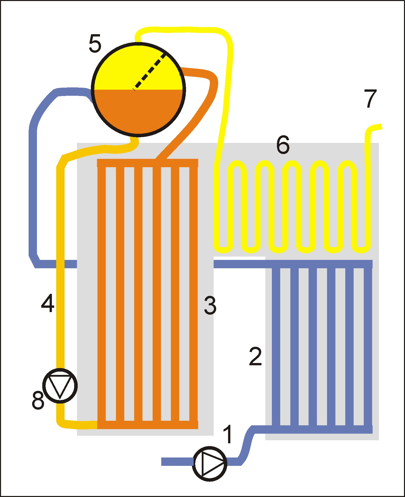 Zwangsumlaufkessel